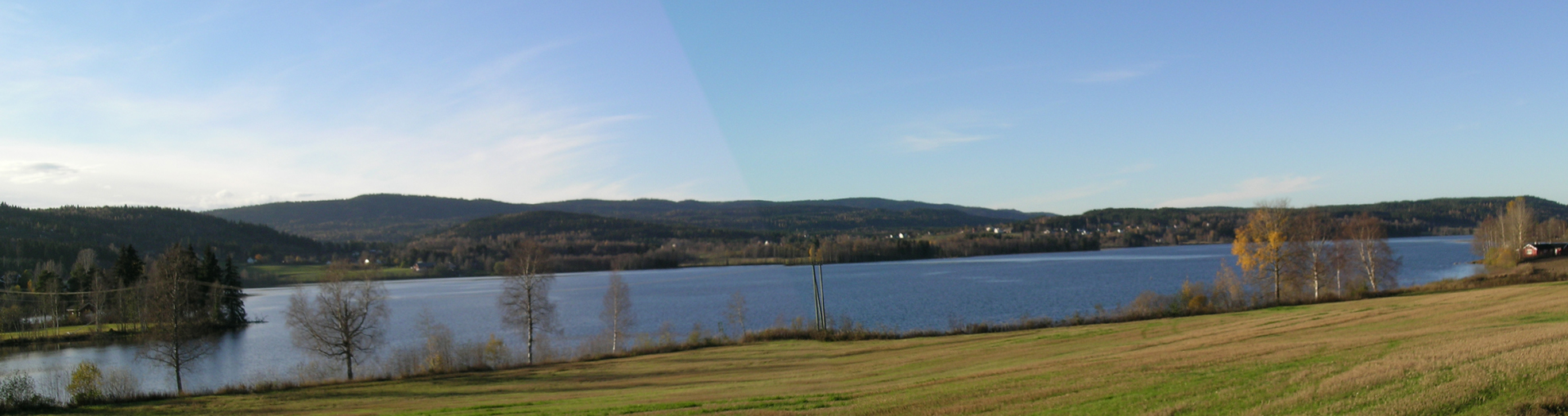 Lake Råsen, Nord-Odal, Hedmark, Norway.